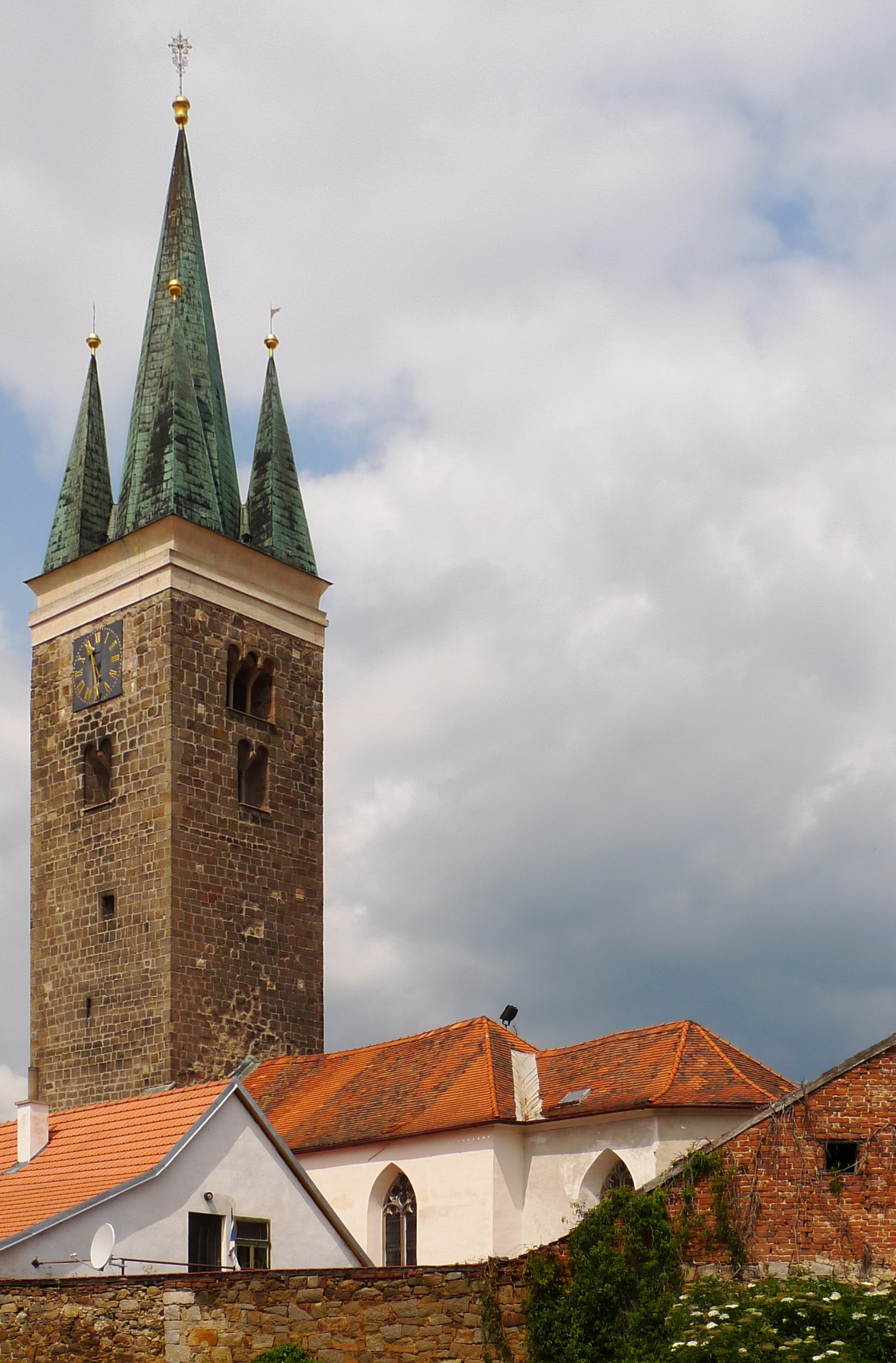 Kostel sv. Ducha (Telč), Palackého, Telč